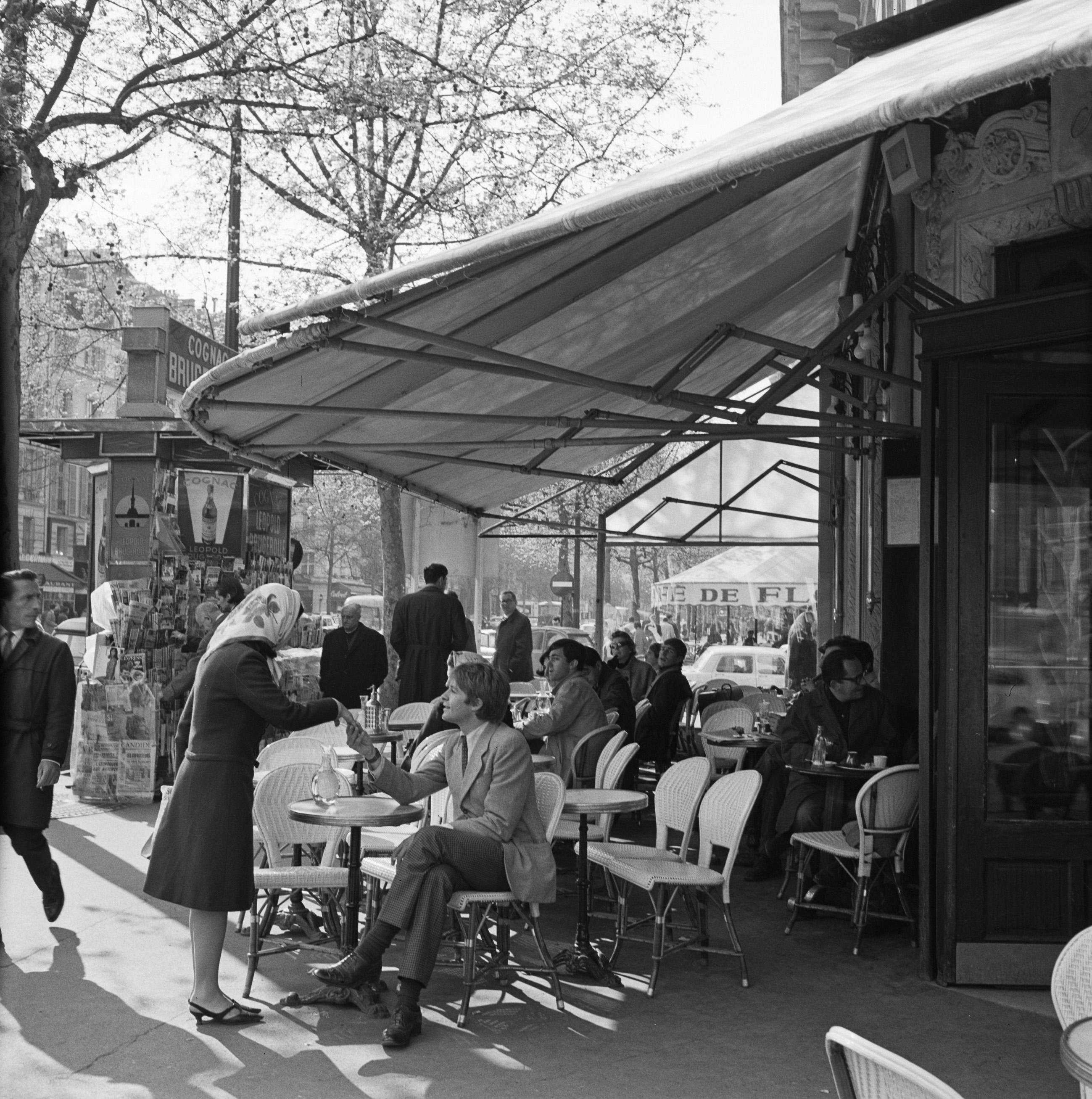 Collectie / Archief : Fotocollectie Van de Poll Reportage / Serie : Pariser Bilder [Het straatleven van Parijs] Beschrijving : Ontmoeting op het terras van café-restaurant Deux Magots in Saint-Germain-des-Prés Annotatie : Wijk in het zesde en zevende arrondissement van Parijs, van oudsher bevolkt door kunstenaars, studenten en intellectuelen Datum : 1965 Locatie : Frankrijk, Parijs Trefwoorden : cafés, restaurants, straatbeelden, terrassen Instellingsnaam : Saint-Germain des Prés Fotograaf : Poll, Willem van de Auteursrechthebbende : Nationaal Archief Materiaalsoort : Negatief (6x6) Nummer archiefinventaris : bekijk toegang 2.24.14.02 Bestanddeelnummer : 254-0434